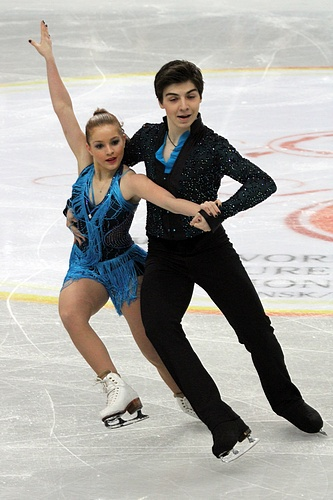 Чагла Демирсал и Берк Акалын (Турция) на чемпионате мира по фигурному катанию среди юниоров 2012